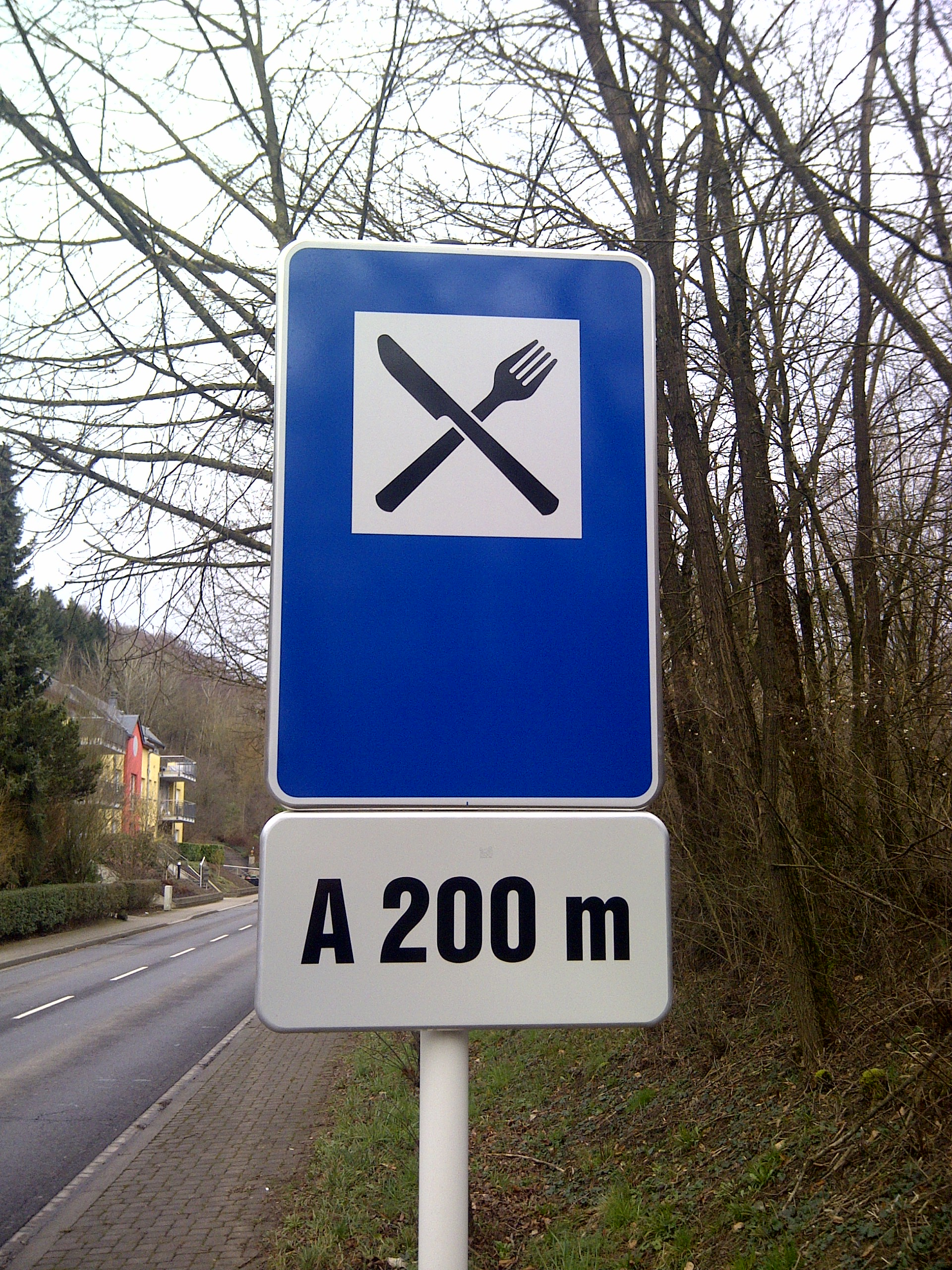 Variant vum Verkéiersschëld F,16 "Restaurant" aus dem lëtzebuerger Code de la Route; um Originalschëld muss e Läffel amplaz engem Messer sinn!